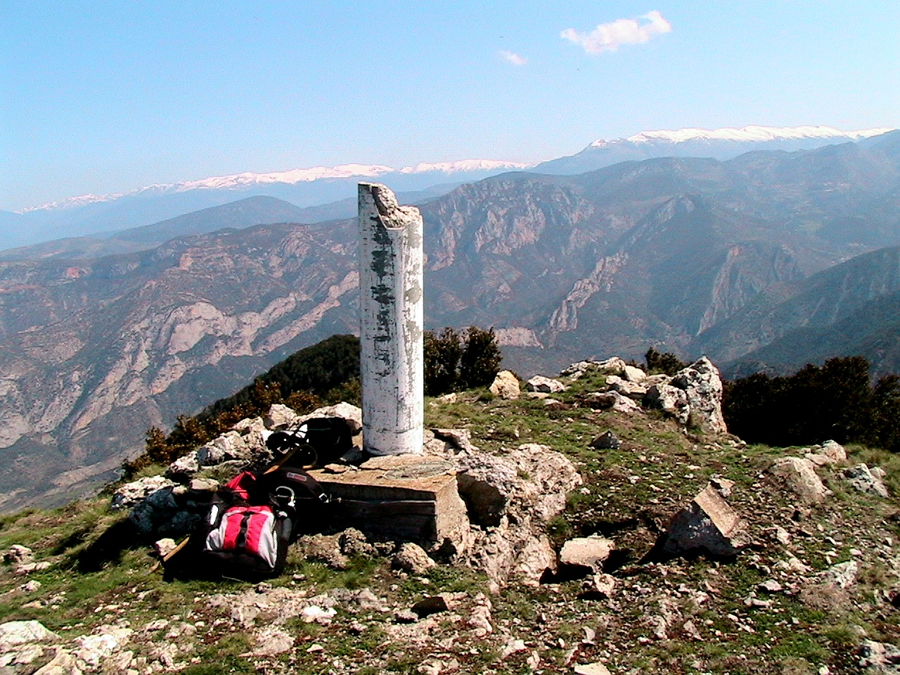 Cim del pic de Turb. Fígols i Alinyà (Alt Urgell - Catalunya)